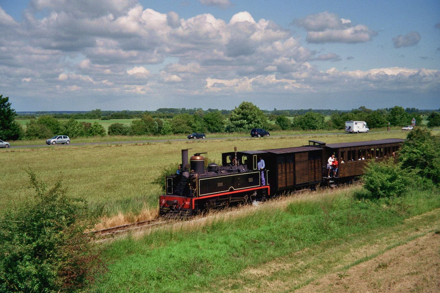 La 130T Cail n° 2 avec un train de voyageurs peu avant Le Crotoy.